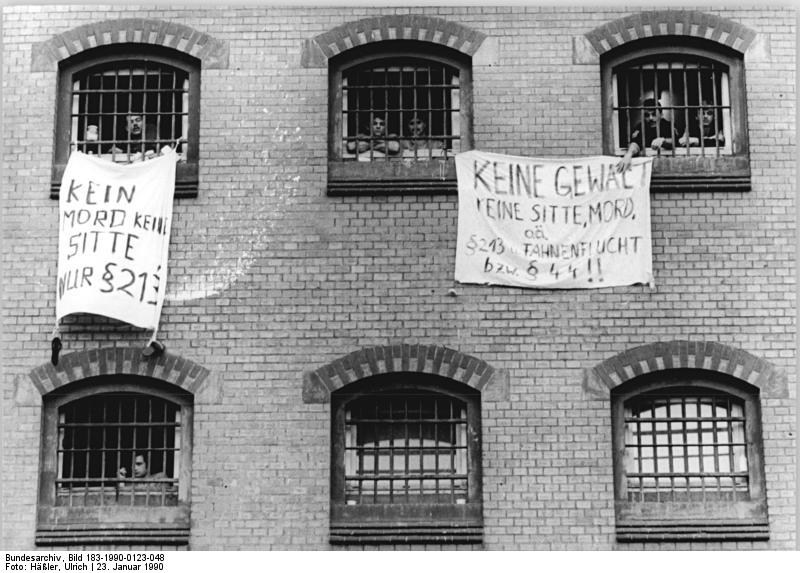 ADN-ZB Häßler 23.1.90 Bautzen: Ausbruch angedroht- Die ihre Freilassung fordernden Strafgefangenen von Bautzen I verwehren sich dagegen, schwere Verbrechen begangen zu haben. Angeblich sitzen sie wegen "ungesetzlichen Grenzübertritts" und Fahnenflucht ein.